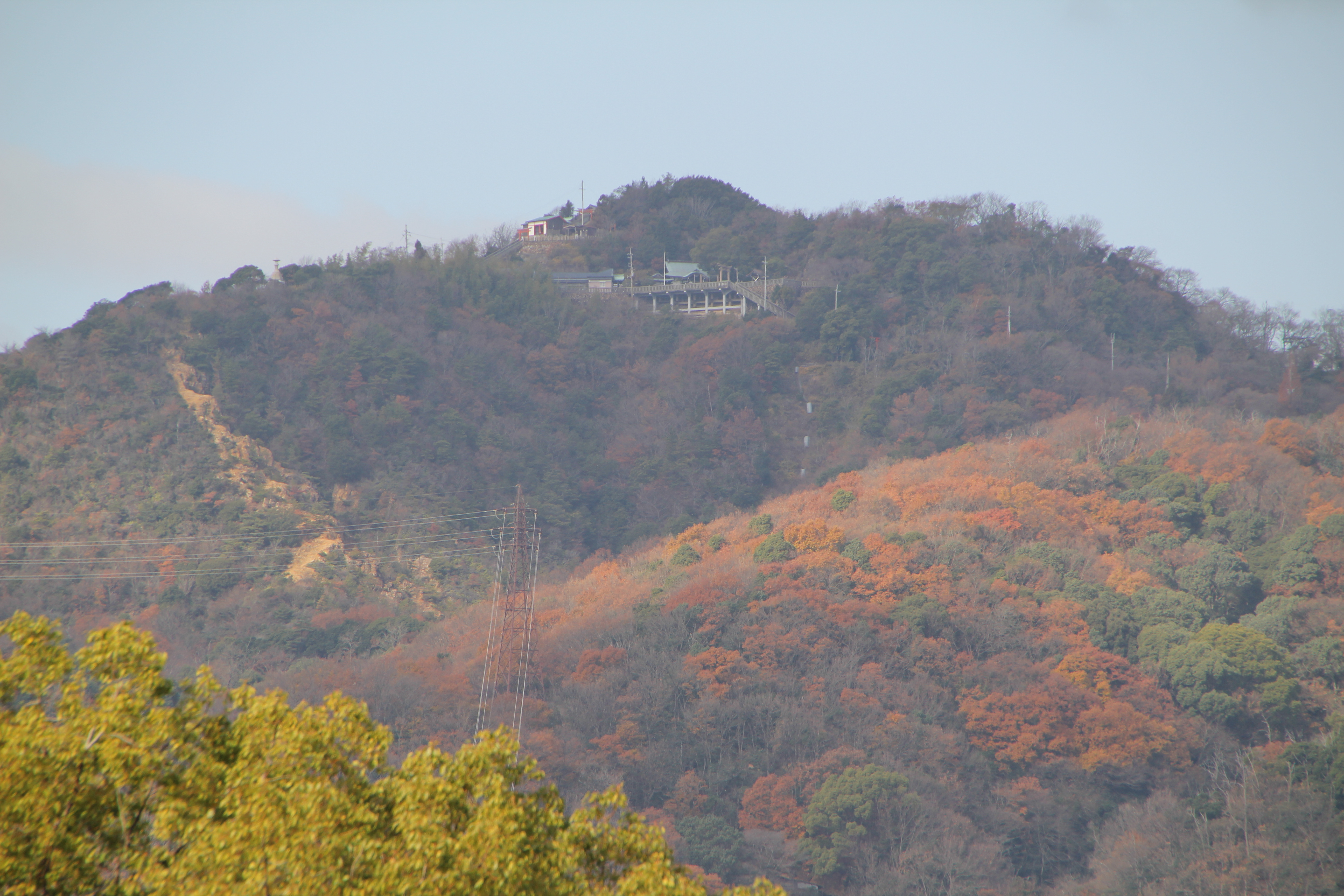 神戸市 六甲山地 高取山